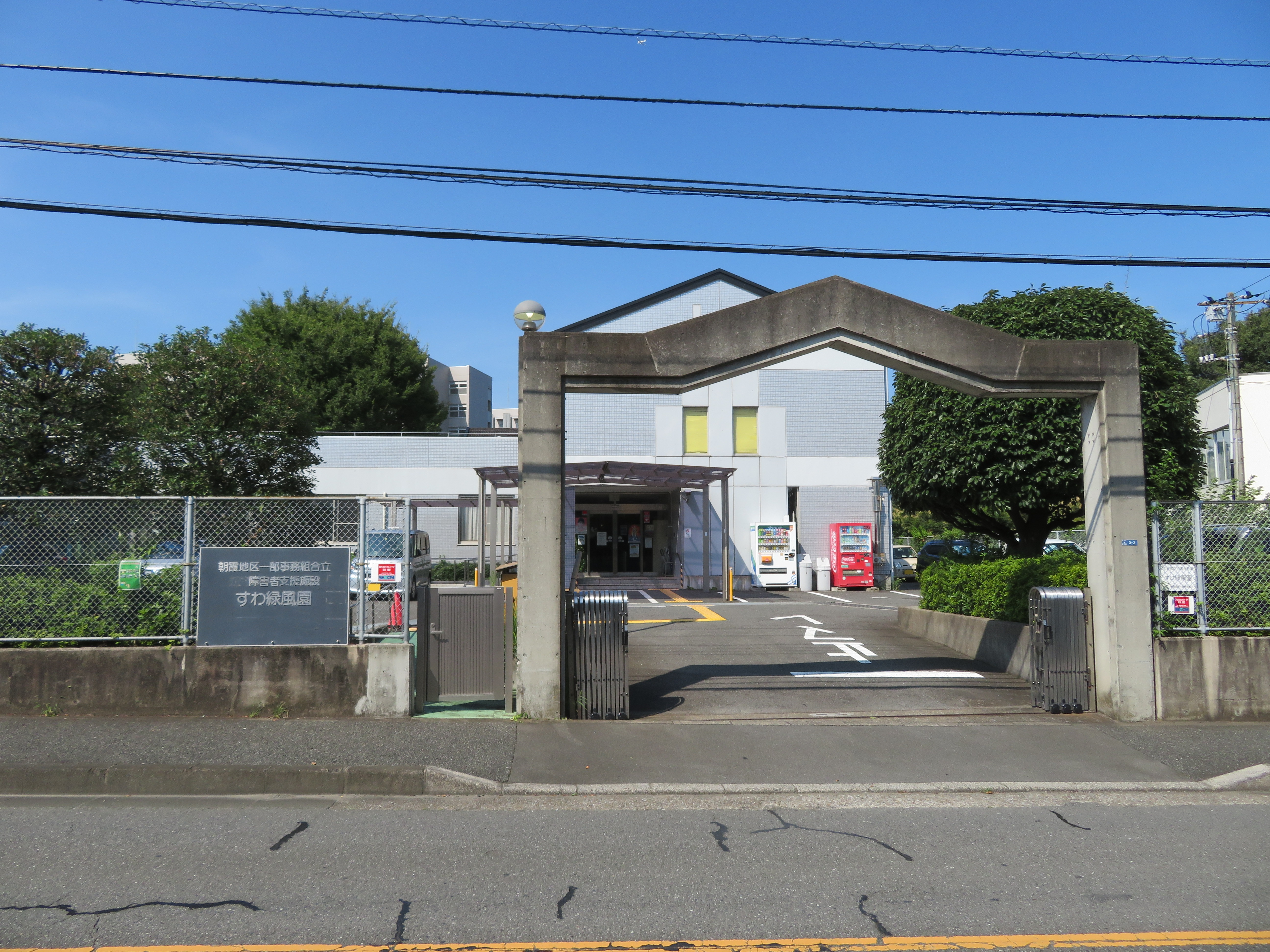 埼玉県和光市に所在する朝霞地区一部事務組合立障害者支援施設すわ緑風園